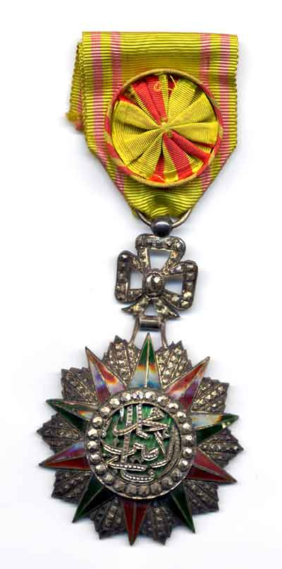 Médaille d'officier Bertrand Bouret